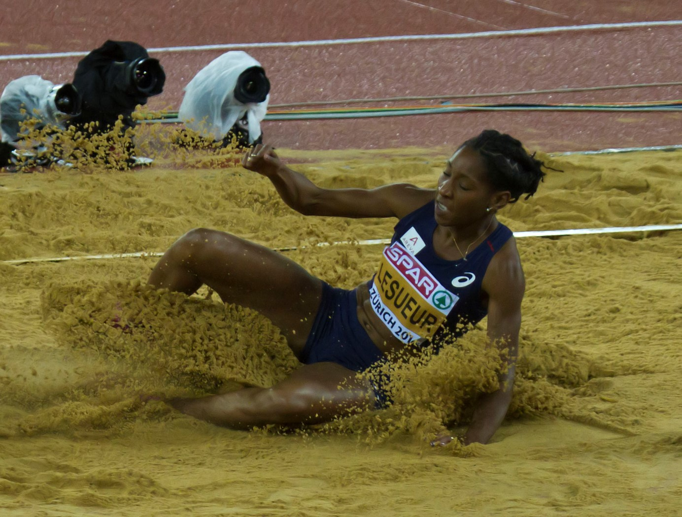 537 winnares lesueur